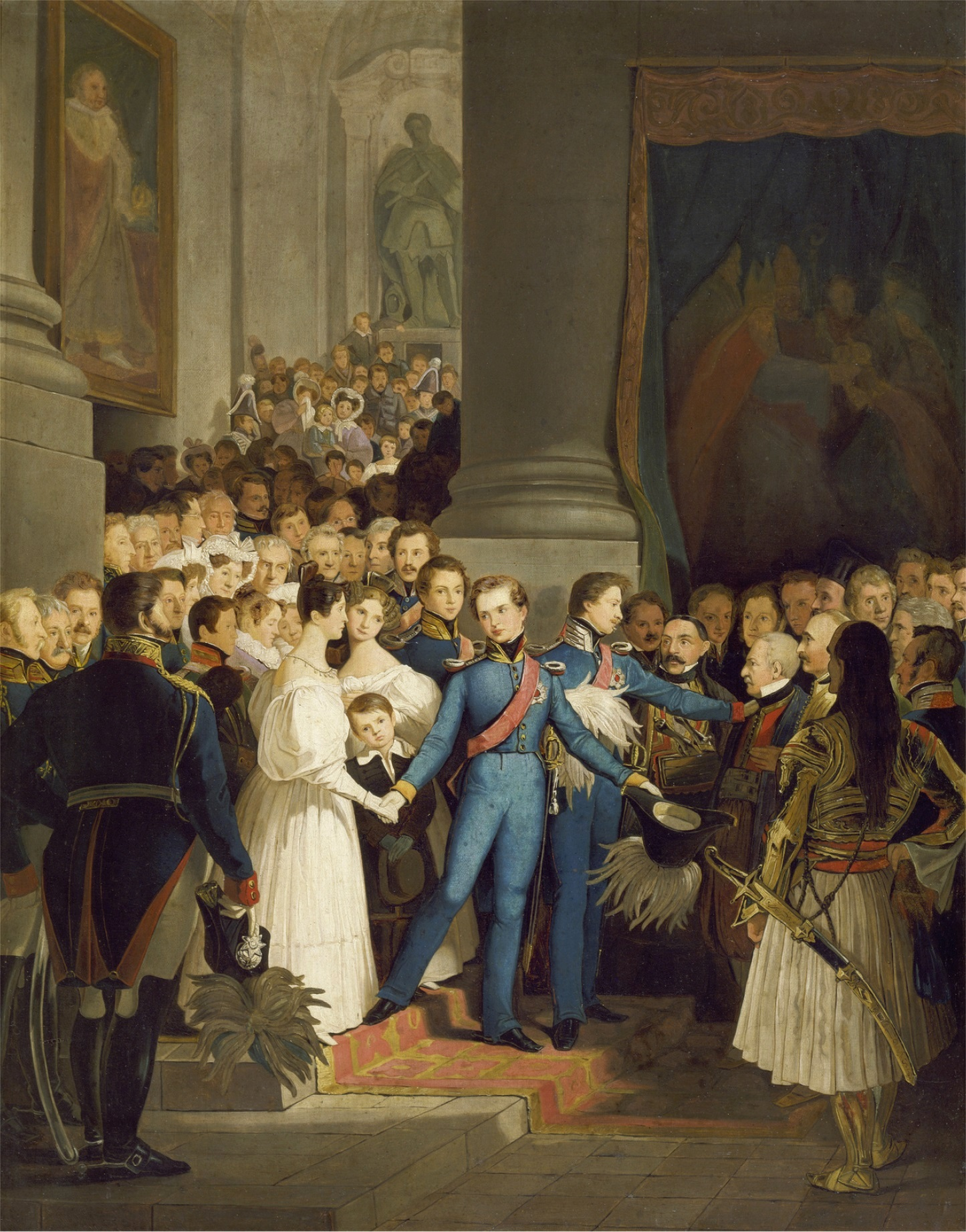 Otto I., König von Griechenland (1832–62); 1815–1867. / – “Der Abschied König Ottos vom Münchner Hof” (6. Dez. 1832; der junge König zwischen seinen Eltern Königin Therese und König Ludwig I. von Bayern; rechts die griech. Delegation)